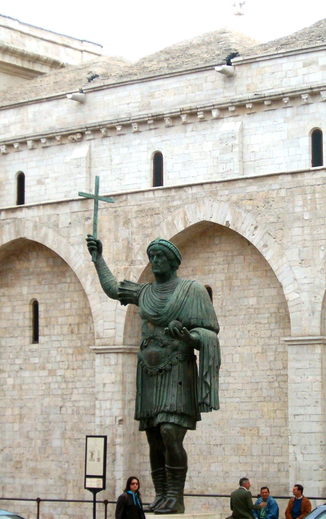 Colosso e chiesa del S. Sepolcro a Barletta (Puglia, Italy)